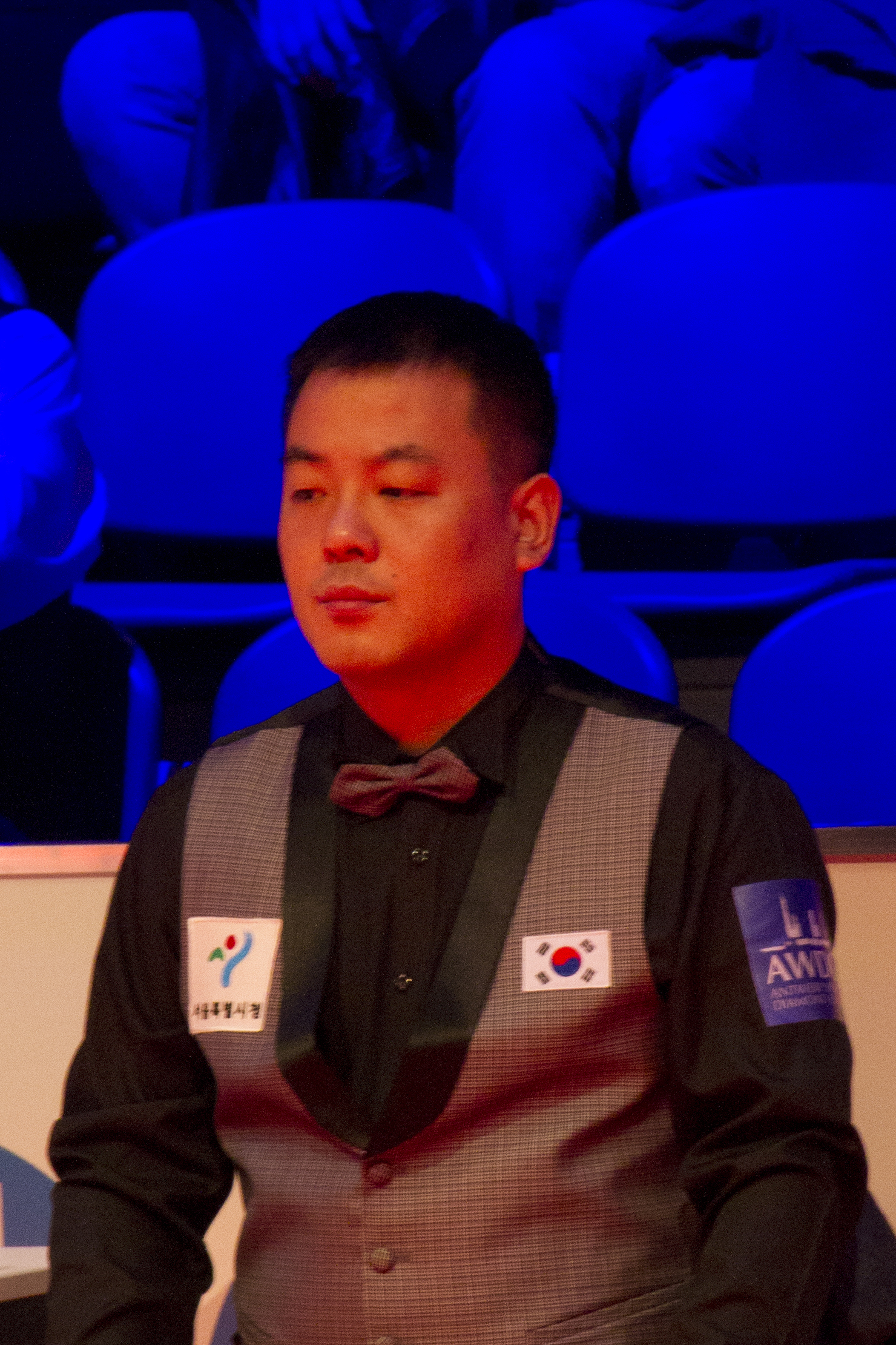 Portrait von . Ausschnitt von File:2013 3-cushion World Championship-Day 2-Session 3-31.jpg.